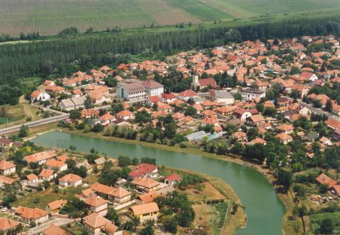 Tószeg, Hungary, aerialphotgraphy